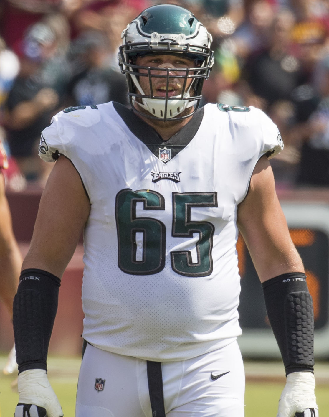 Eagles at Redskins 9/10/17